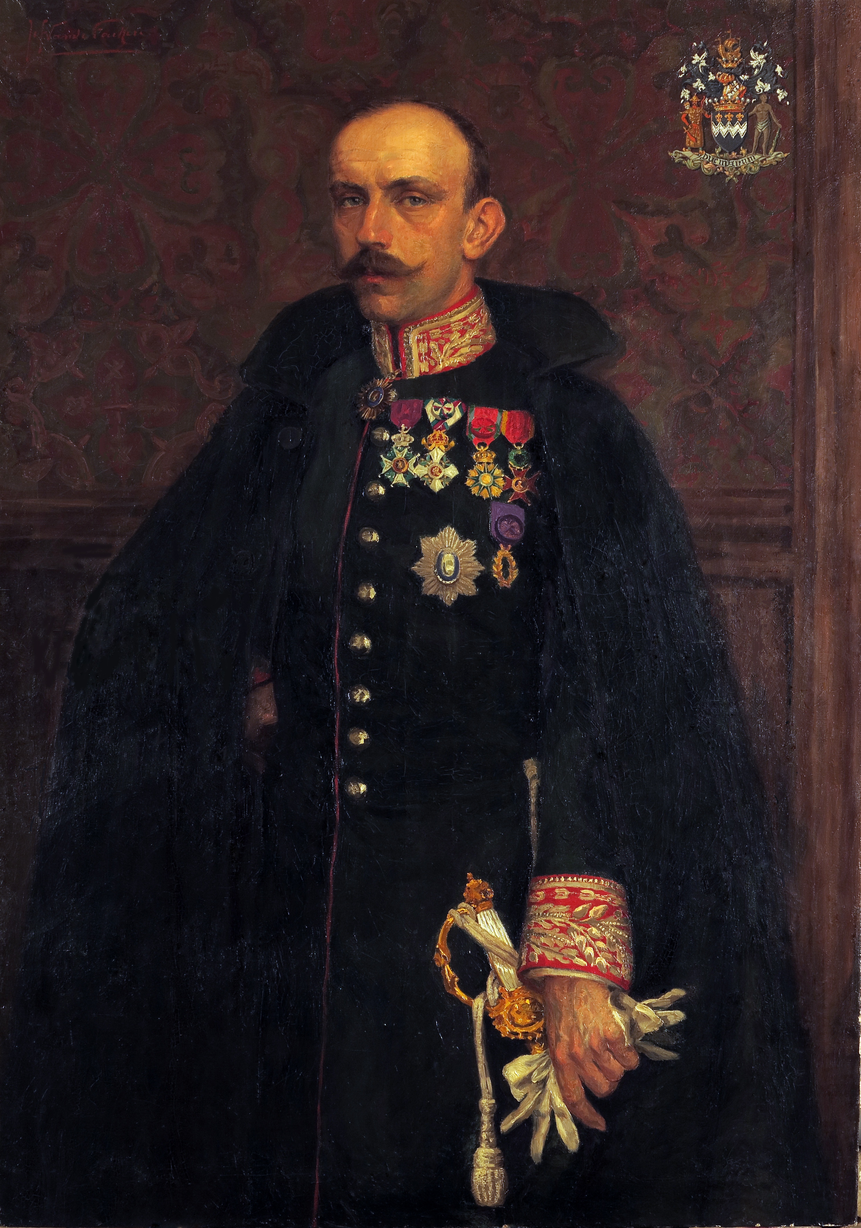 par Jef Van de Fackere, ca 1905